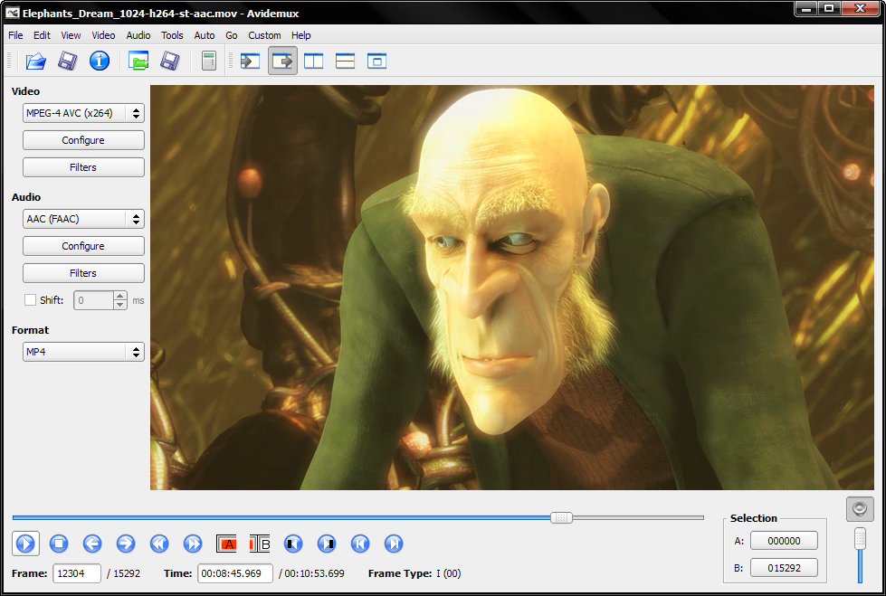 Avidemux 2.4 (Qt Interface)